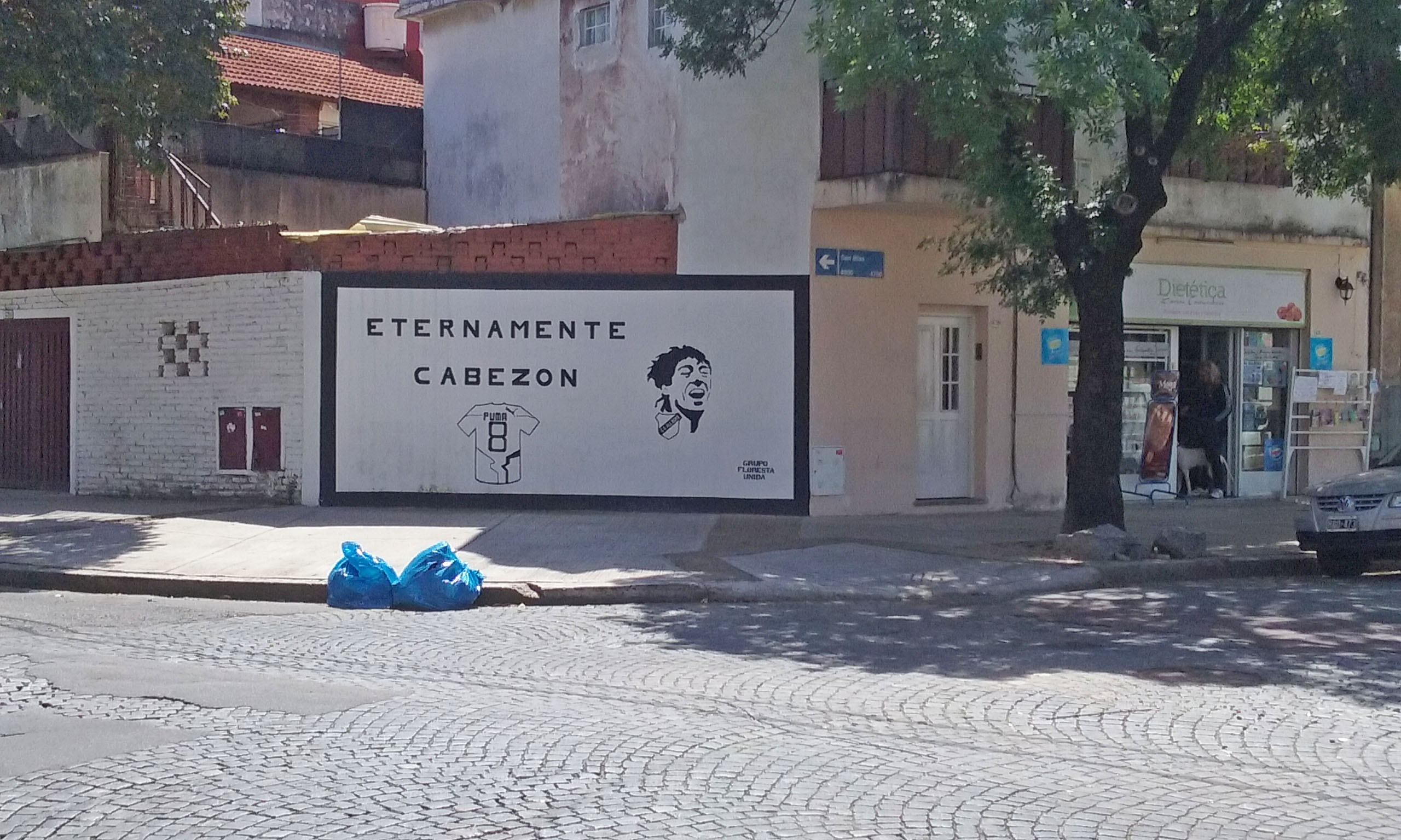 Fotografía del mural realizado por la agrupación "Grupo Floresta Unida" en homenaje a Fernando Sánchez tomada con mi Samsung Galaxy Core Prime Duo